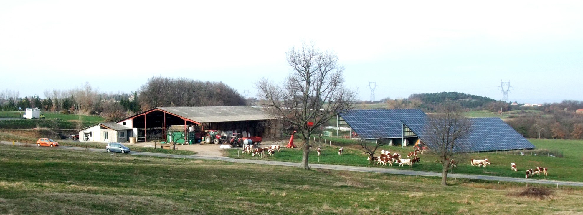 Vernosc ferme